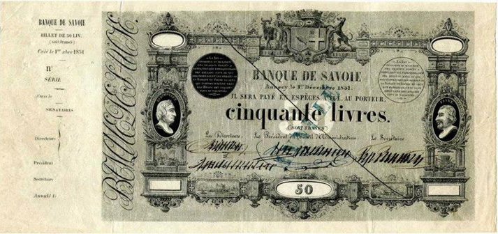 Billet de banque en livres savoyardes, également dite livres savoisiennes, émis par la Banque de Savoie, avant 1860 (Annexion de la Savoie par la France).